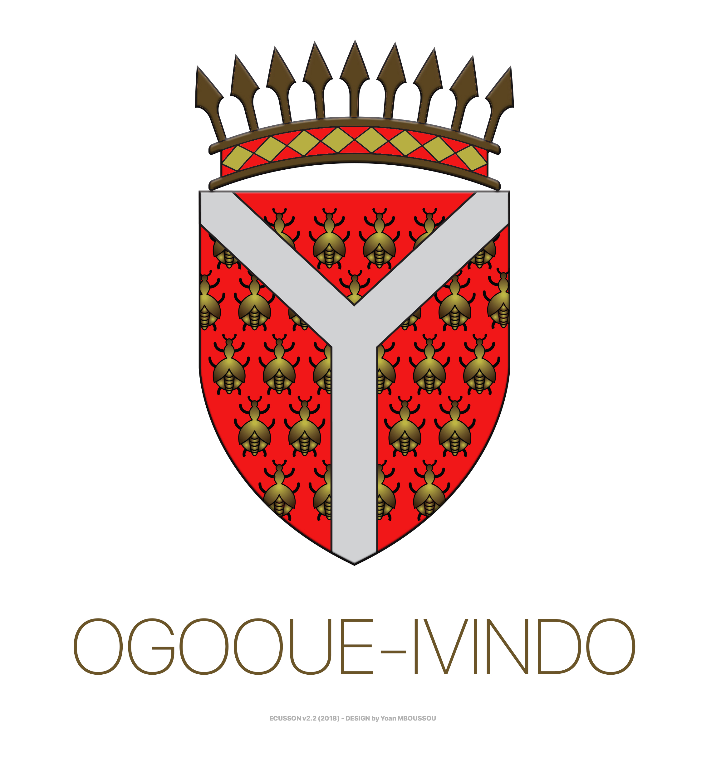 Ecusson de l’Ogooué-Ivindo